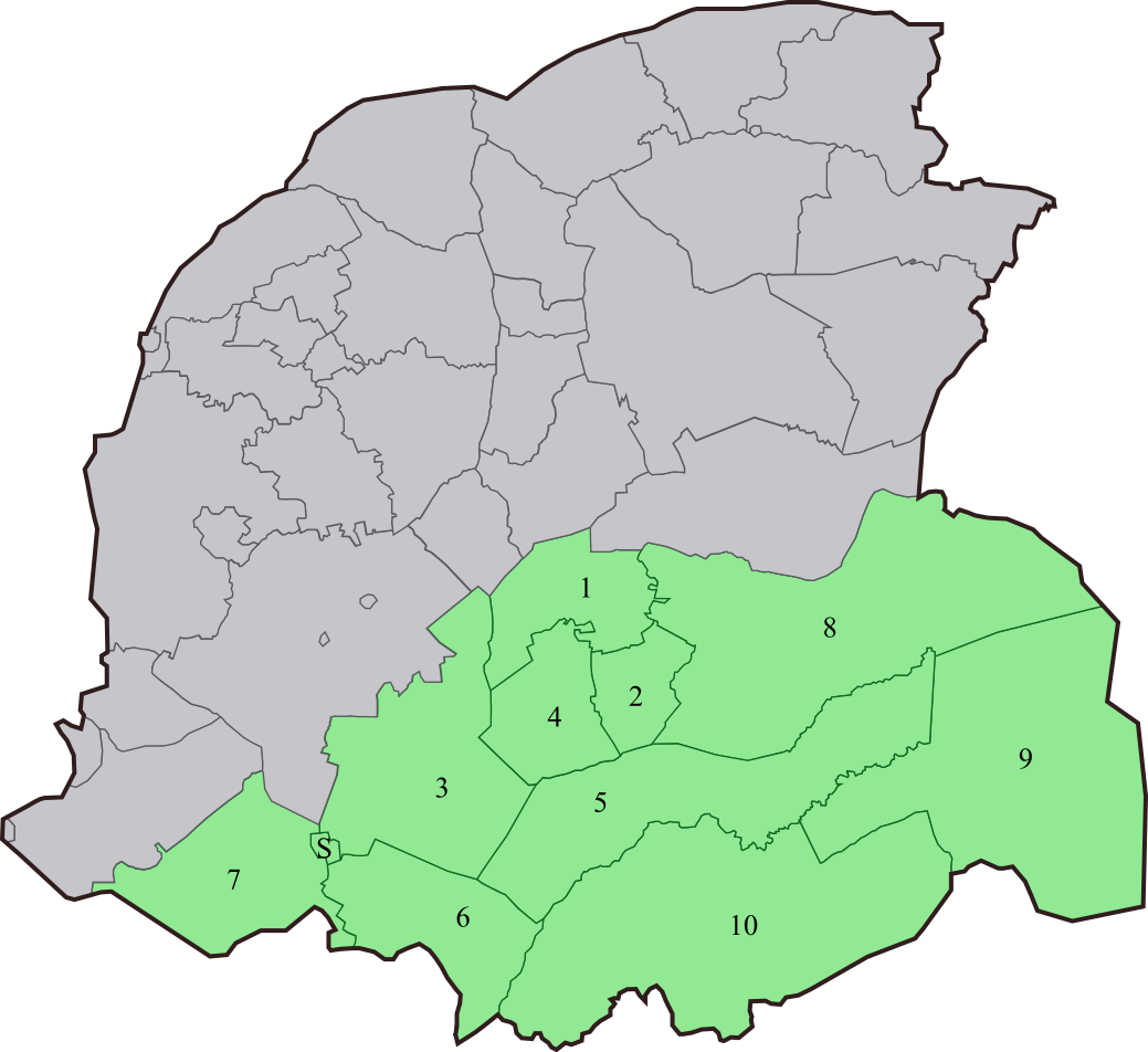 Nedersaksies: van fy-wiki Kattegerie:Ofbeelding:Locatie